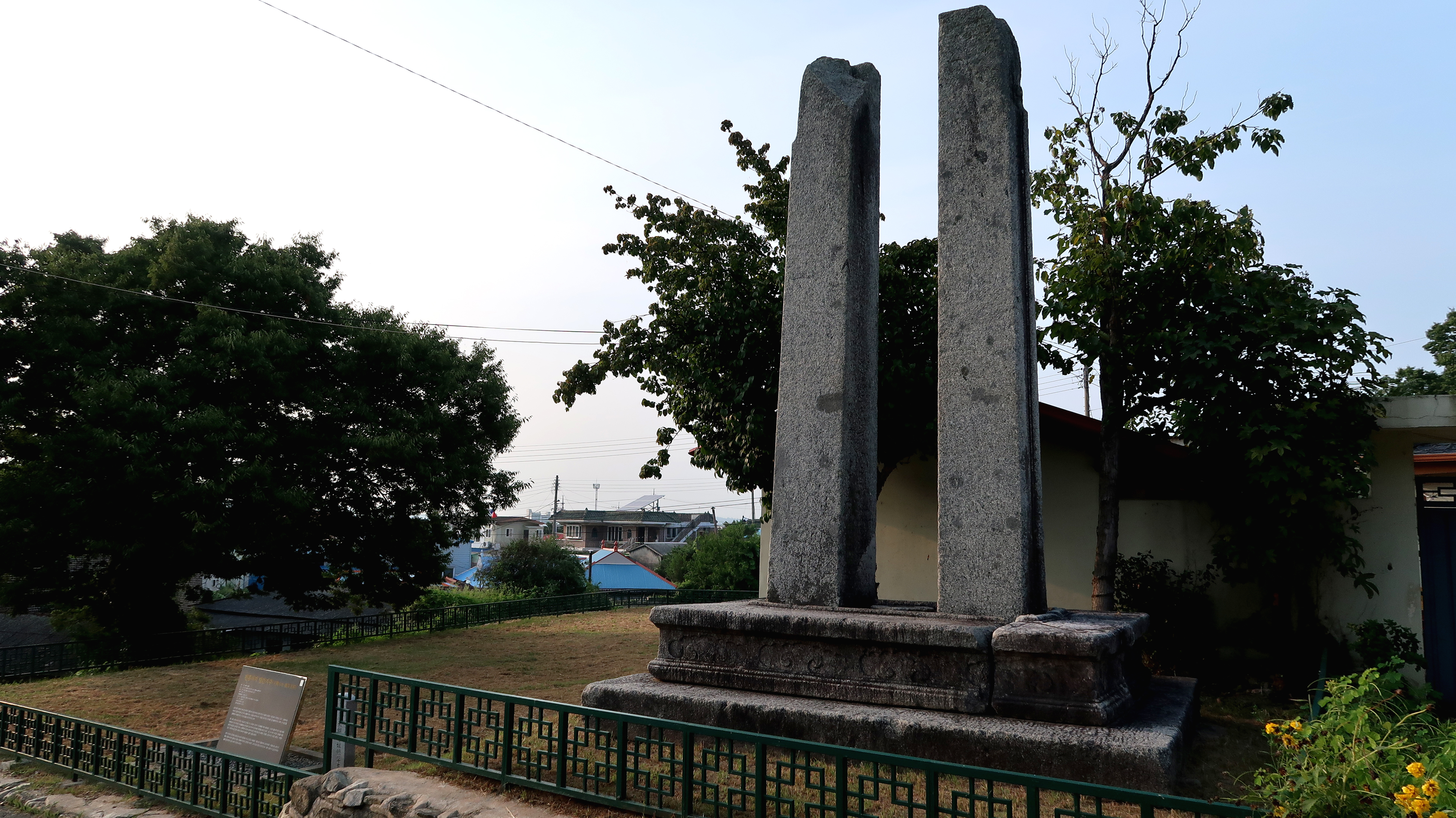 천흥사지 당간지주 (주소: 충남 천안시 서북구 성거읍 천흥4길 115-5)